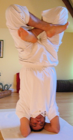 Yoga postures Padma-shirshasana